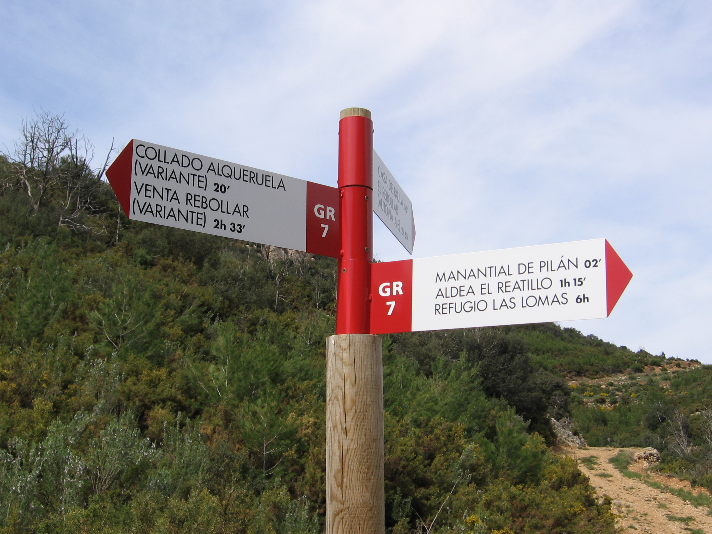 Poste del sendero GR-7 en la etapa de la Comunidad Valenciana (Spain): El Reatillo - Ventilla del Rebollar